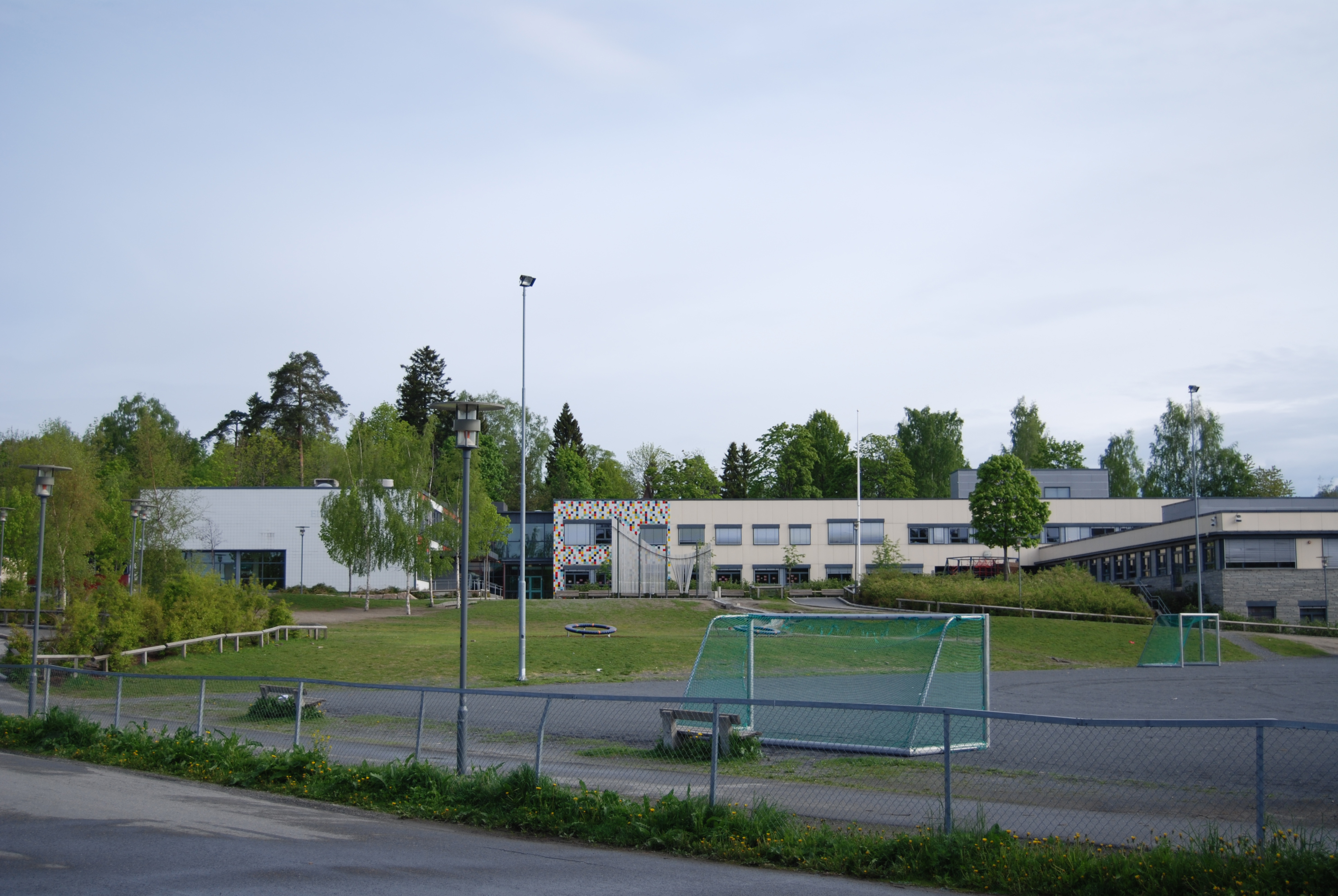 Eiksmarka Skole 24. 05 2009 r.